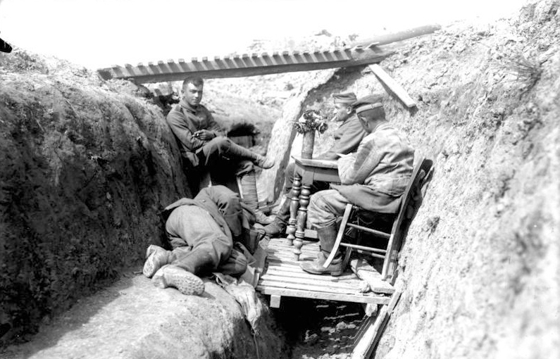 I. Weltkrieg 1914-1918 Nach dem Arbeitsdienst